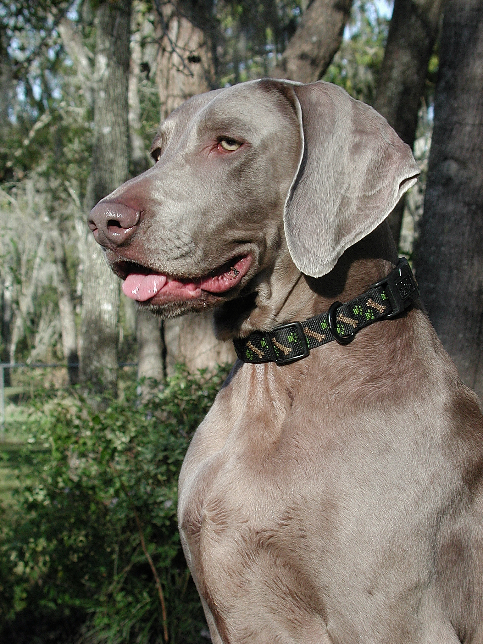 A male Weimaraner named Walker.